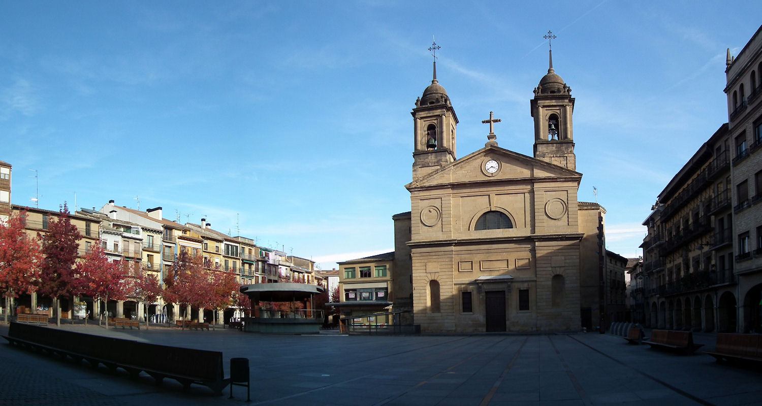 Iglesia de San Juan, Estella, Navarre, Spain